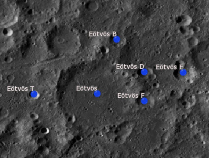 Cráter lunar Eötvös. Cráteres satélite (Imagen LROC)